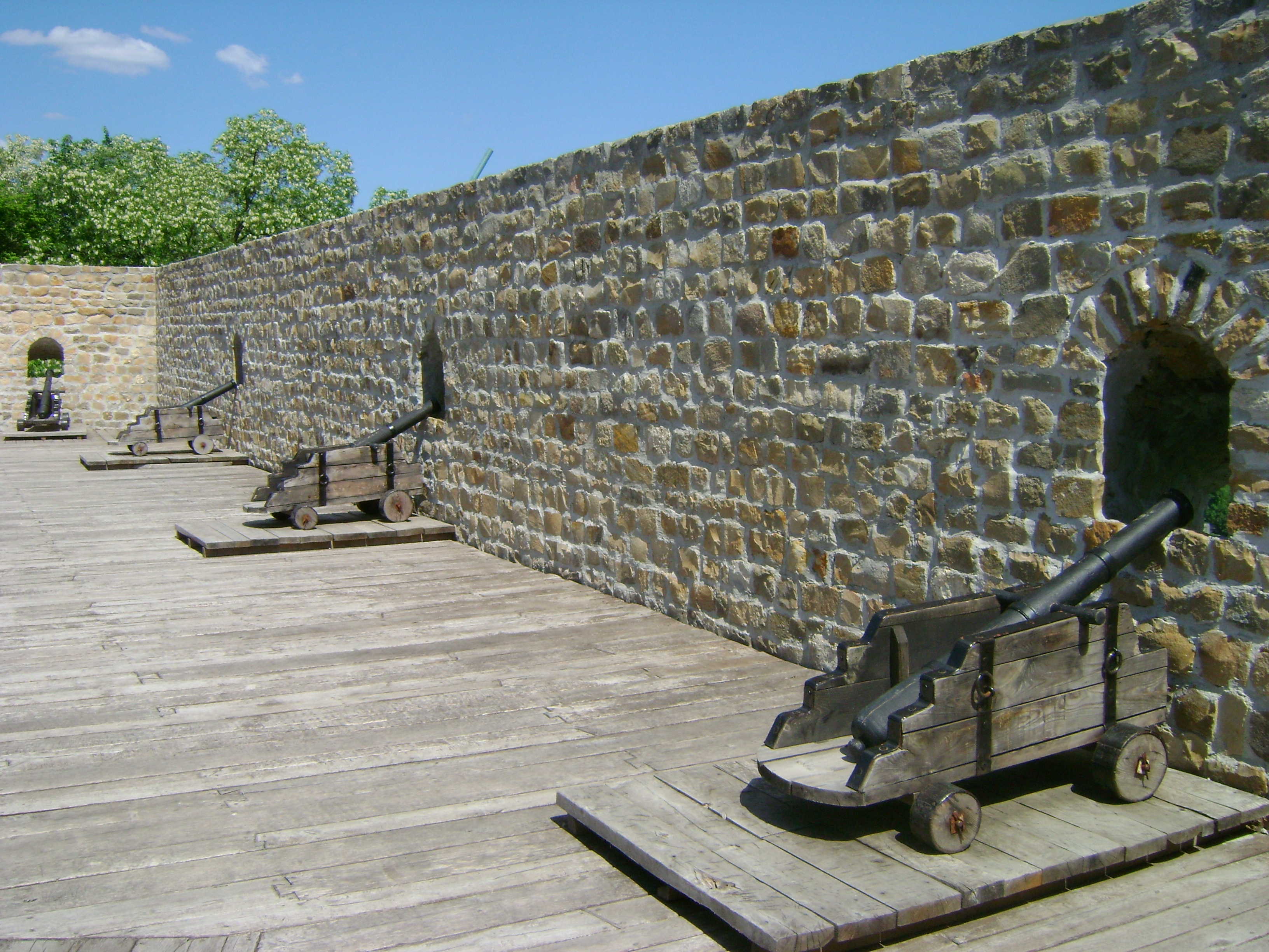 Фортеця (руїни) (Бастіон Дорошенка) (мур.), Чигирин, Богданова Гора